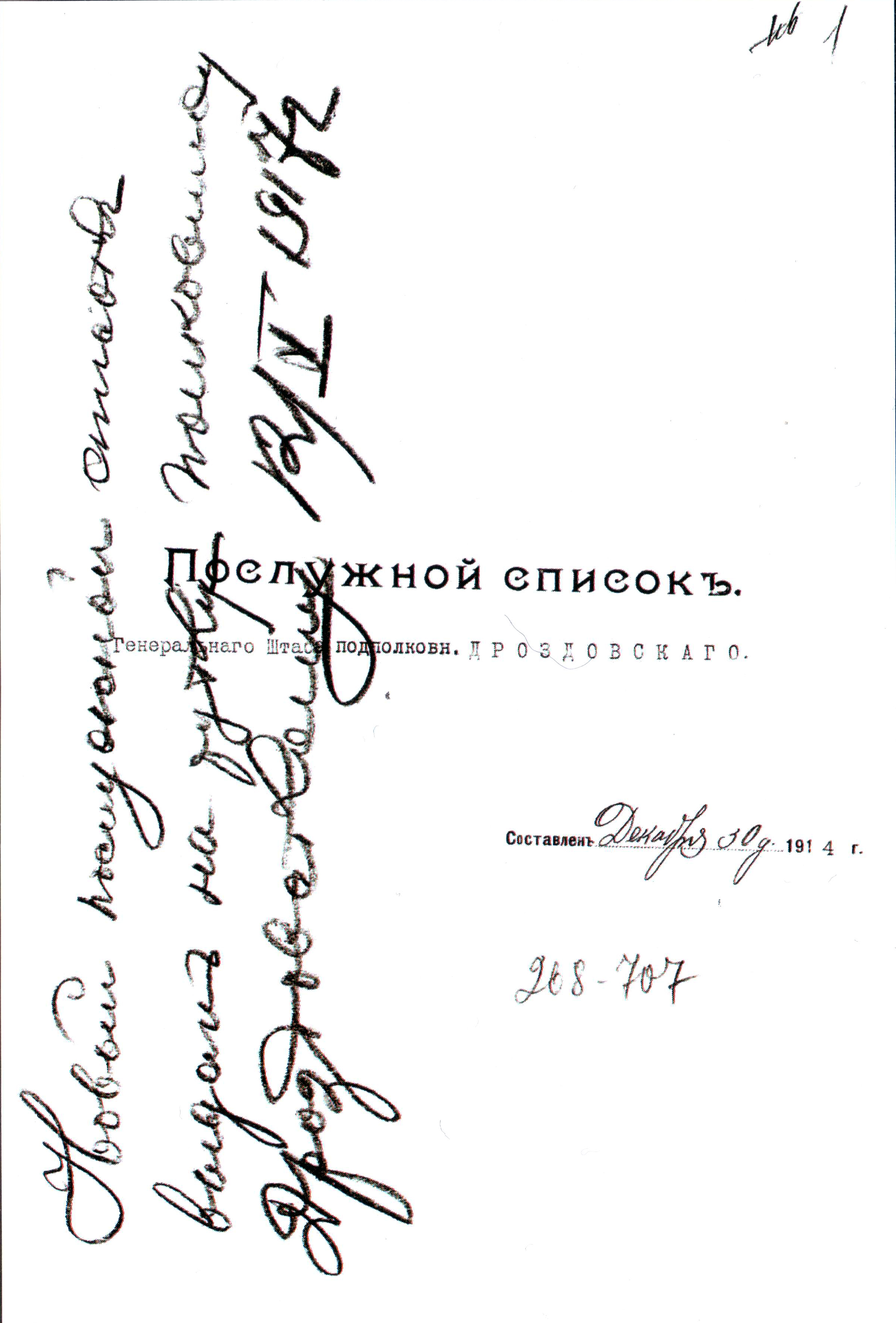 Титульный лист послужного списка подполковника М.Г. Дроздовского. 1914